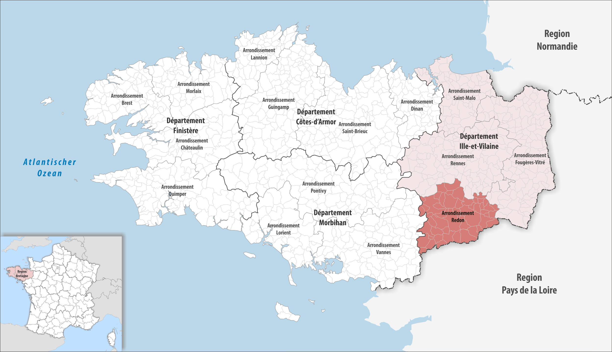 Lage des Arrondissements Redon